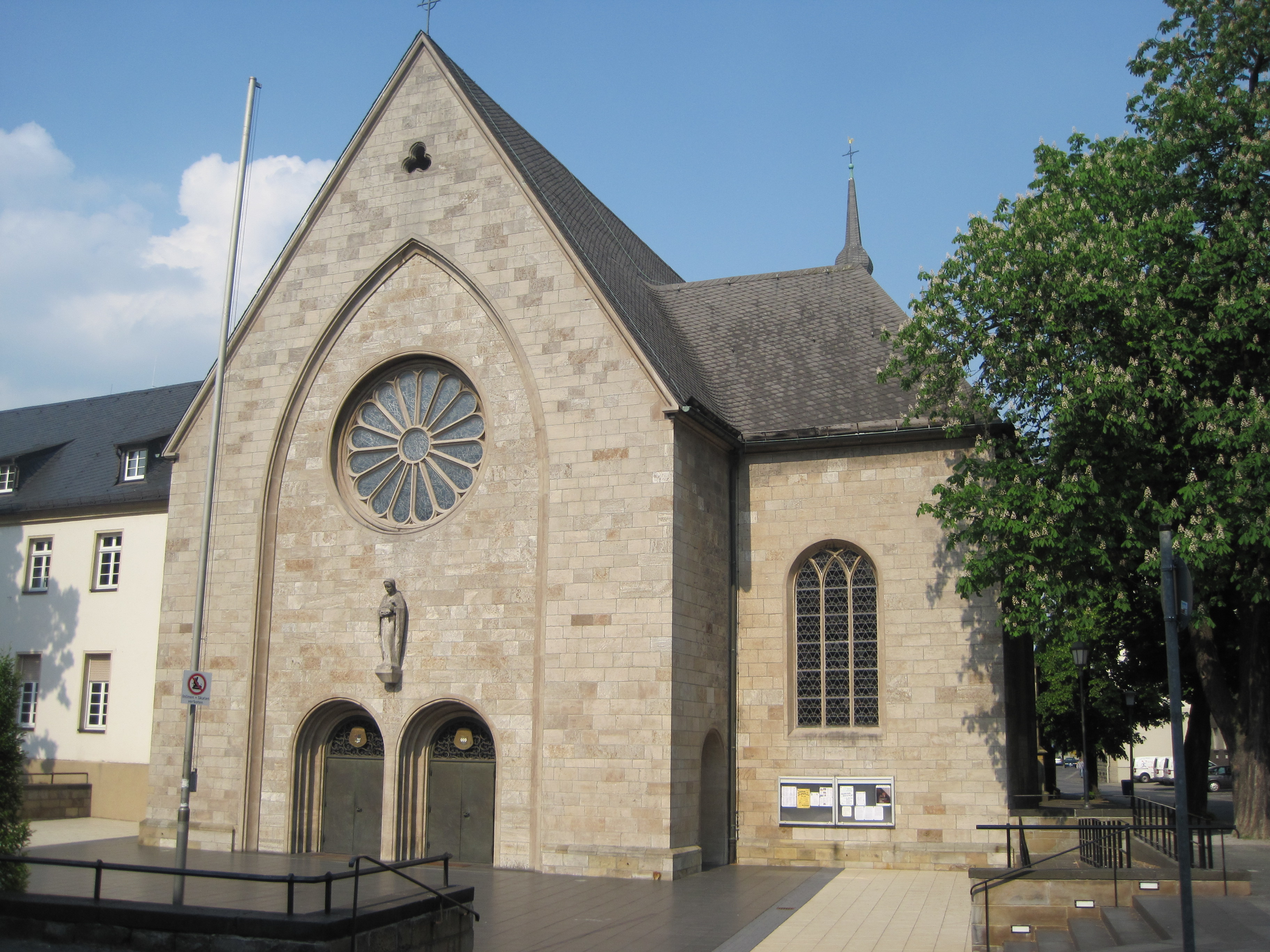 Dieses Foto zeigt den Haupteingang der St. Agnes-Kirche in der Stadt Hamm in Westfalen.